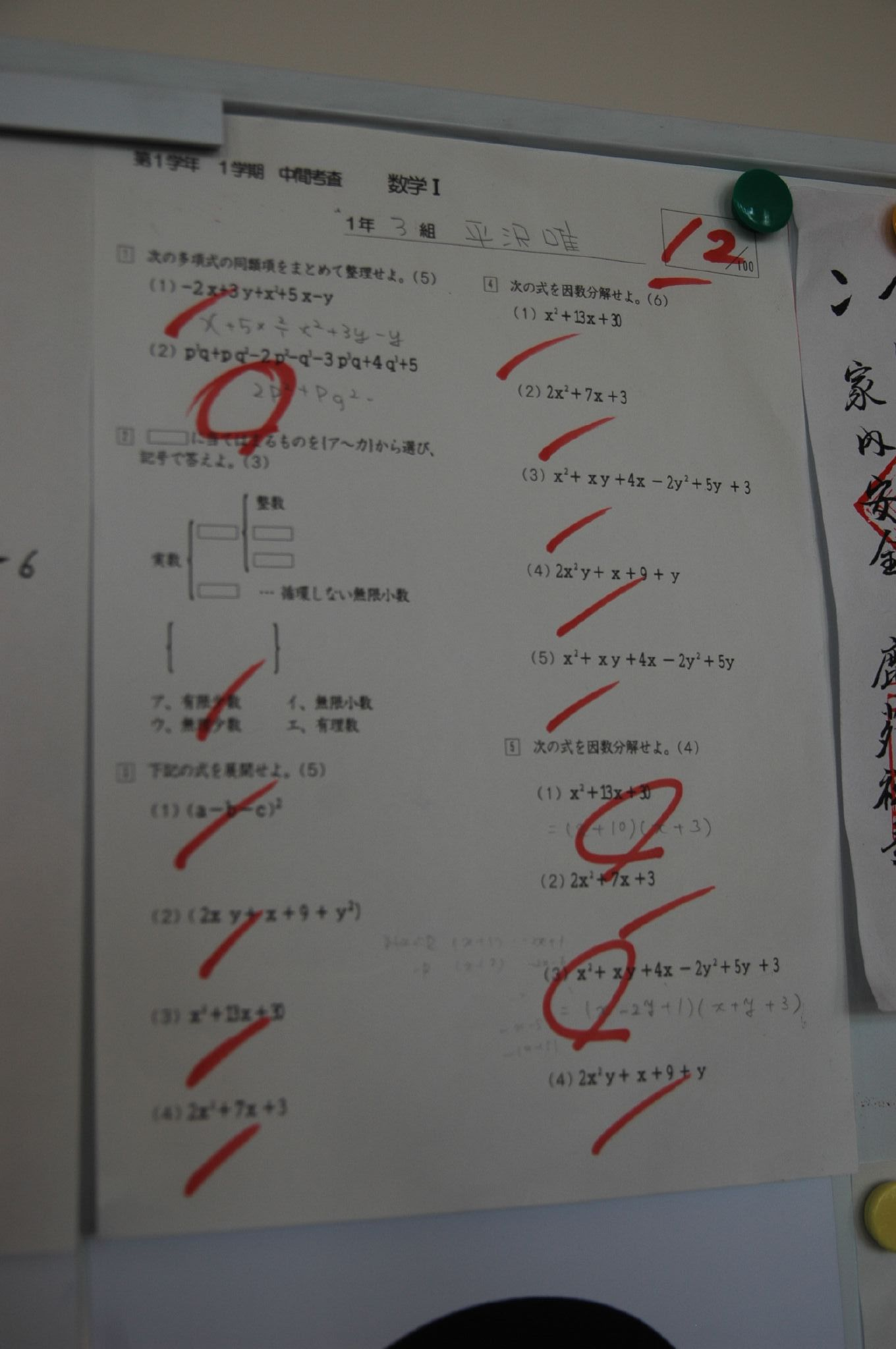 音楽室のホワイトボードにて。 誰が作ったんだｗ 平沢 唯